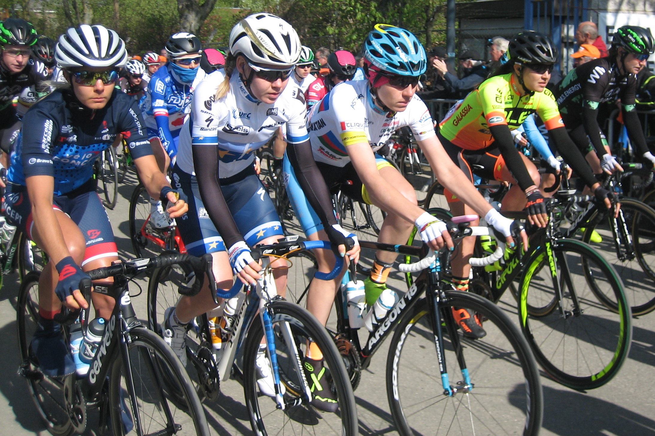 Start van de Waalse Pijl 2017